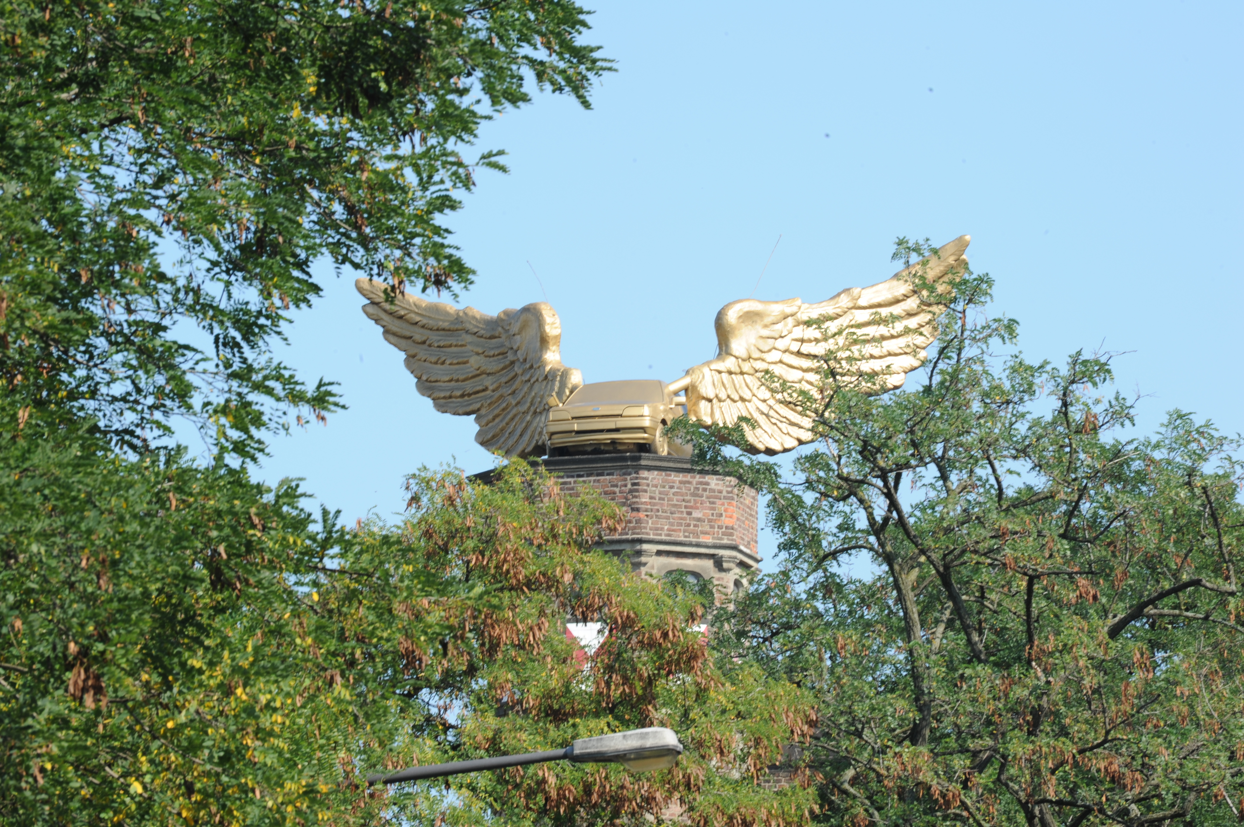 Köln, Zeughaus, Flügelauto von HA Schult, 1991This is a photograph of an architectural monument.